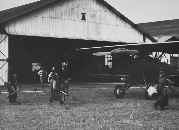 Foto. Militaire oefening gasaanval op het vliegveld Andir bij Bandoeng